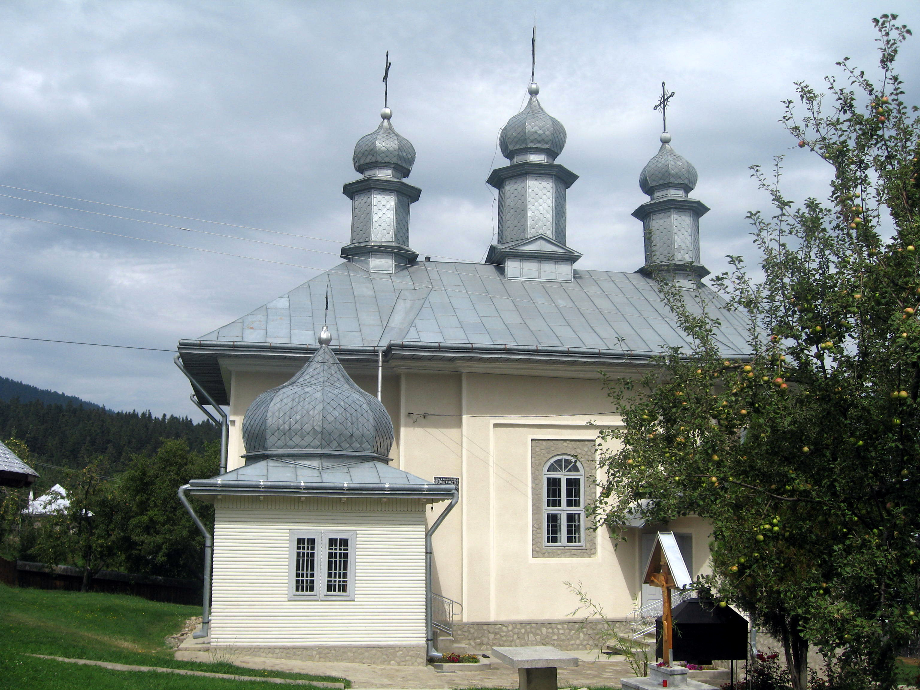 Mănăstirea Văratec